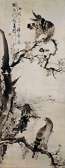 장승업의 호취도